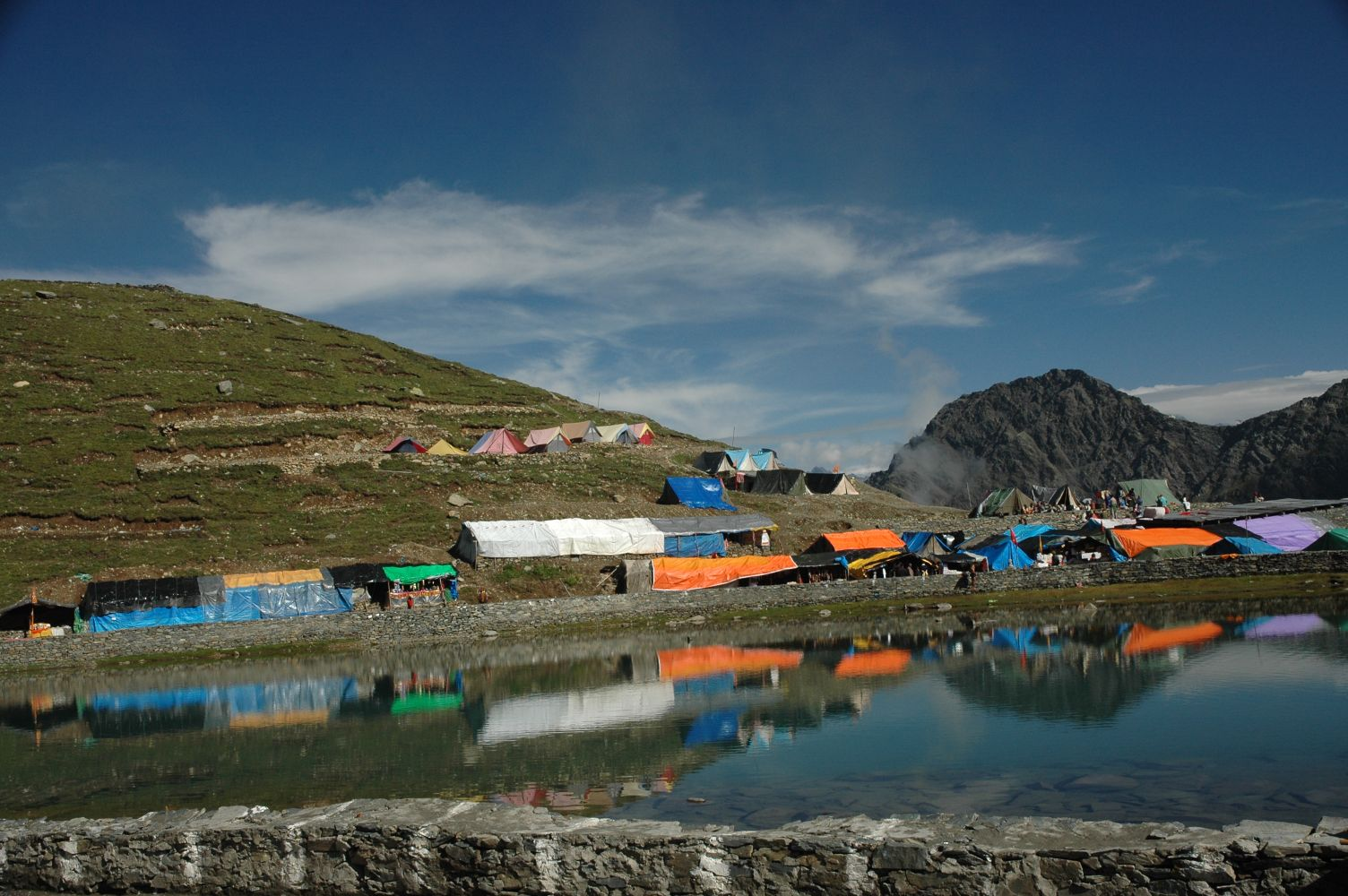 "Manimahesh Lake"